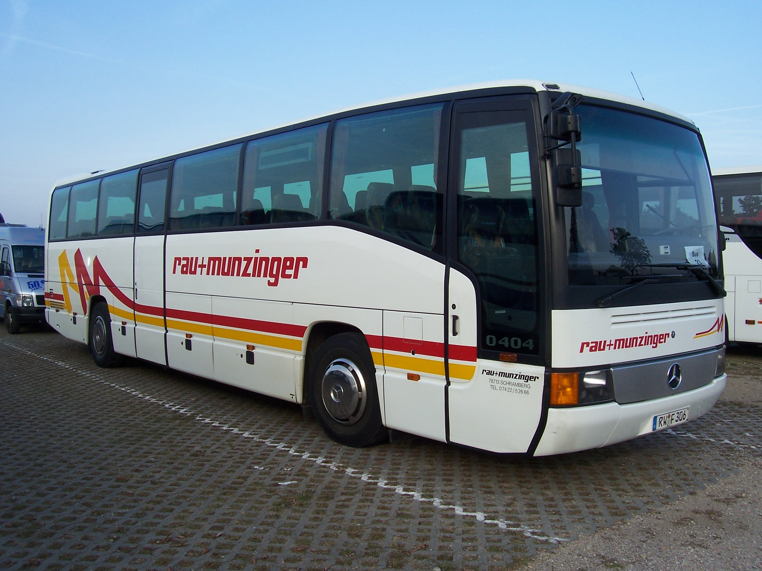 Ein Mercedes-Benz O 404 Reisebus Reisebus in Mannheim